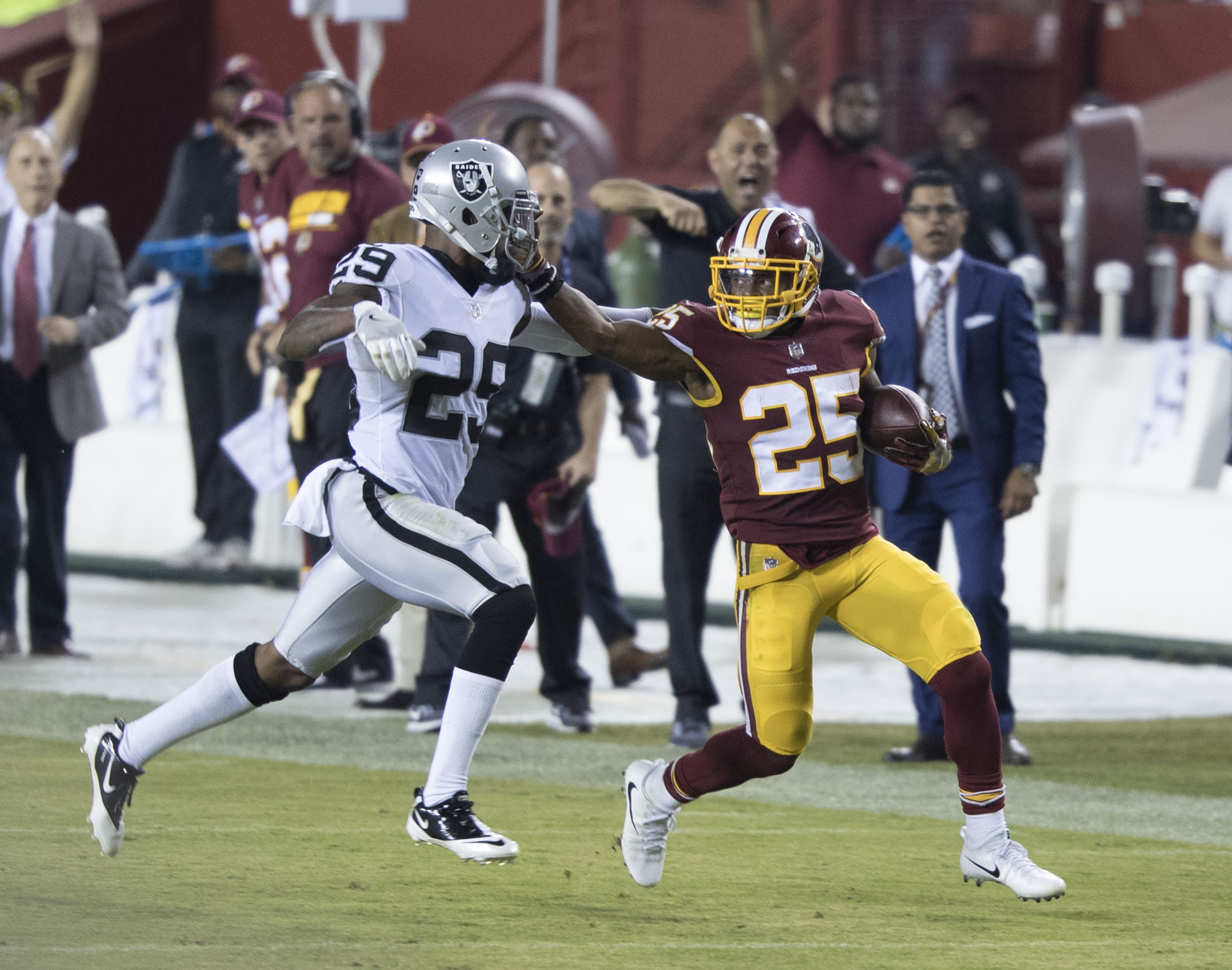 Raiders at Redskins 9/24/17